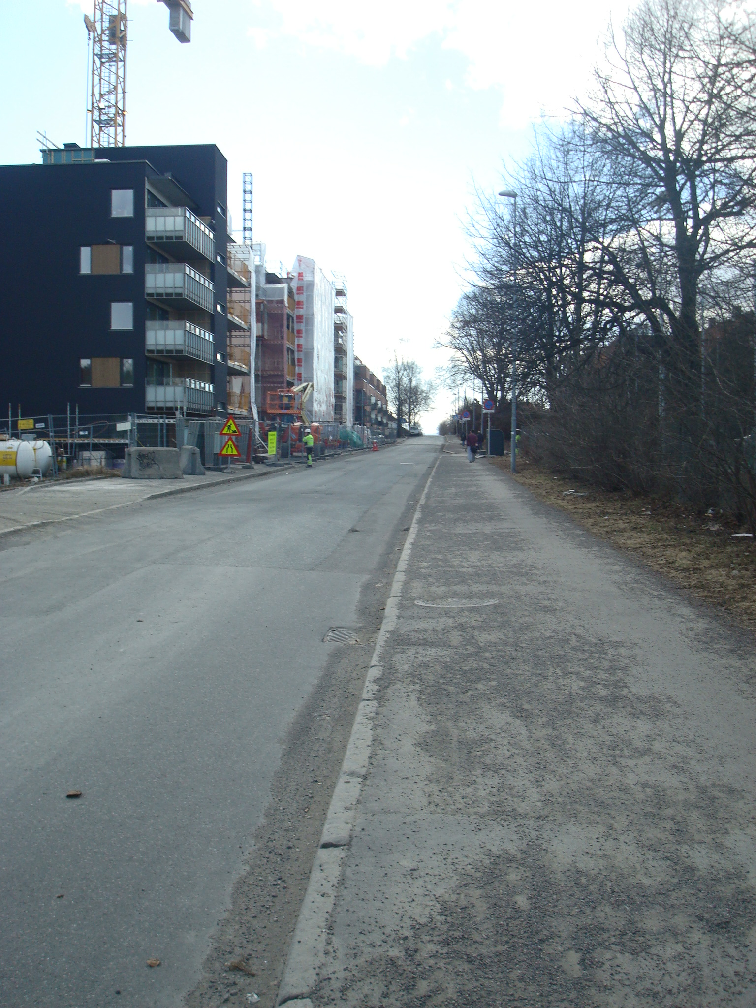 Hovinveien i Oslo. Bilde nær Hasle skole. (2013)